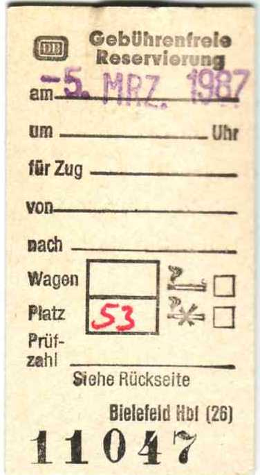 Gebührenfreie Platzreservierung in der Deutschen Bundesbahn